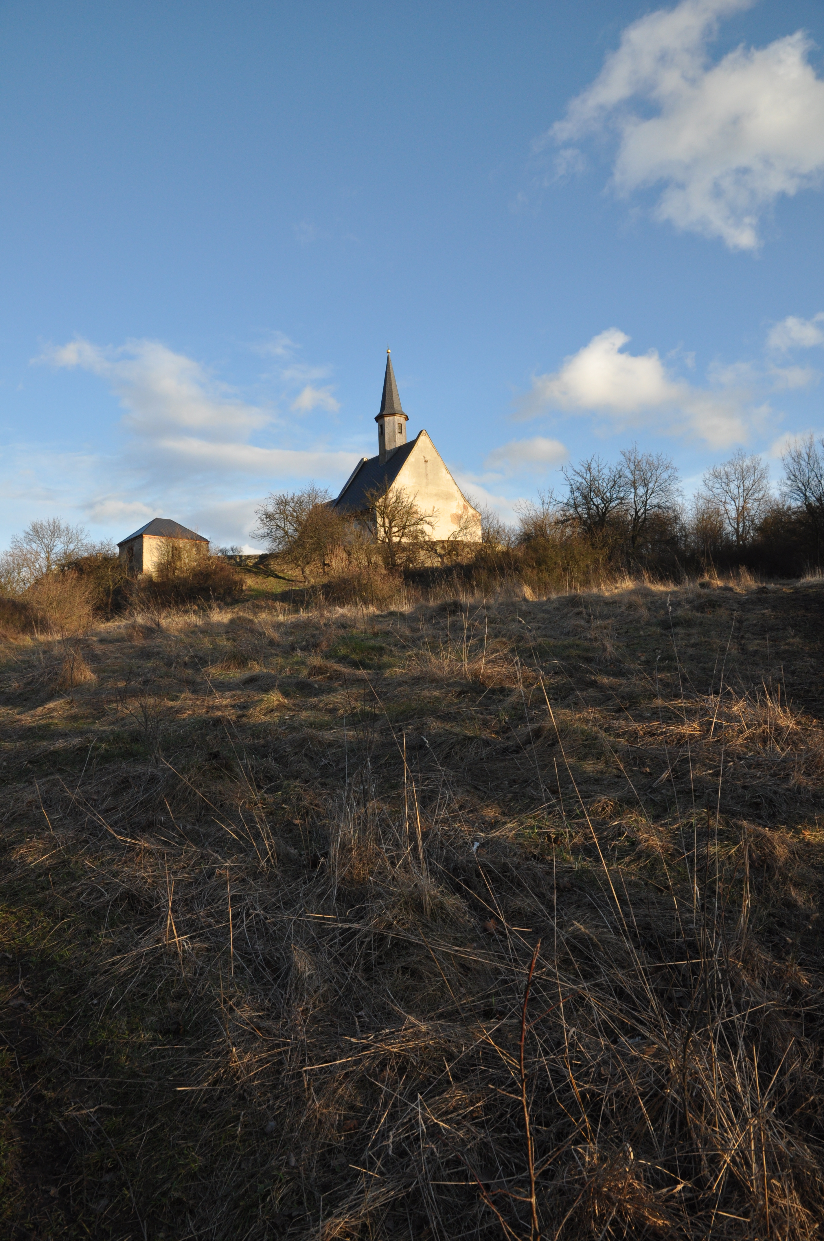 Kostel sv. Vavřince (Želina), Želina